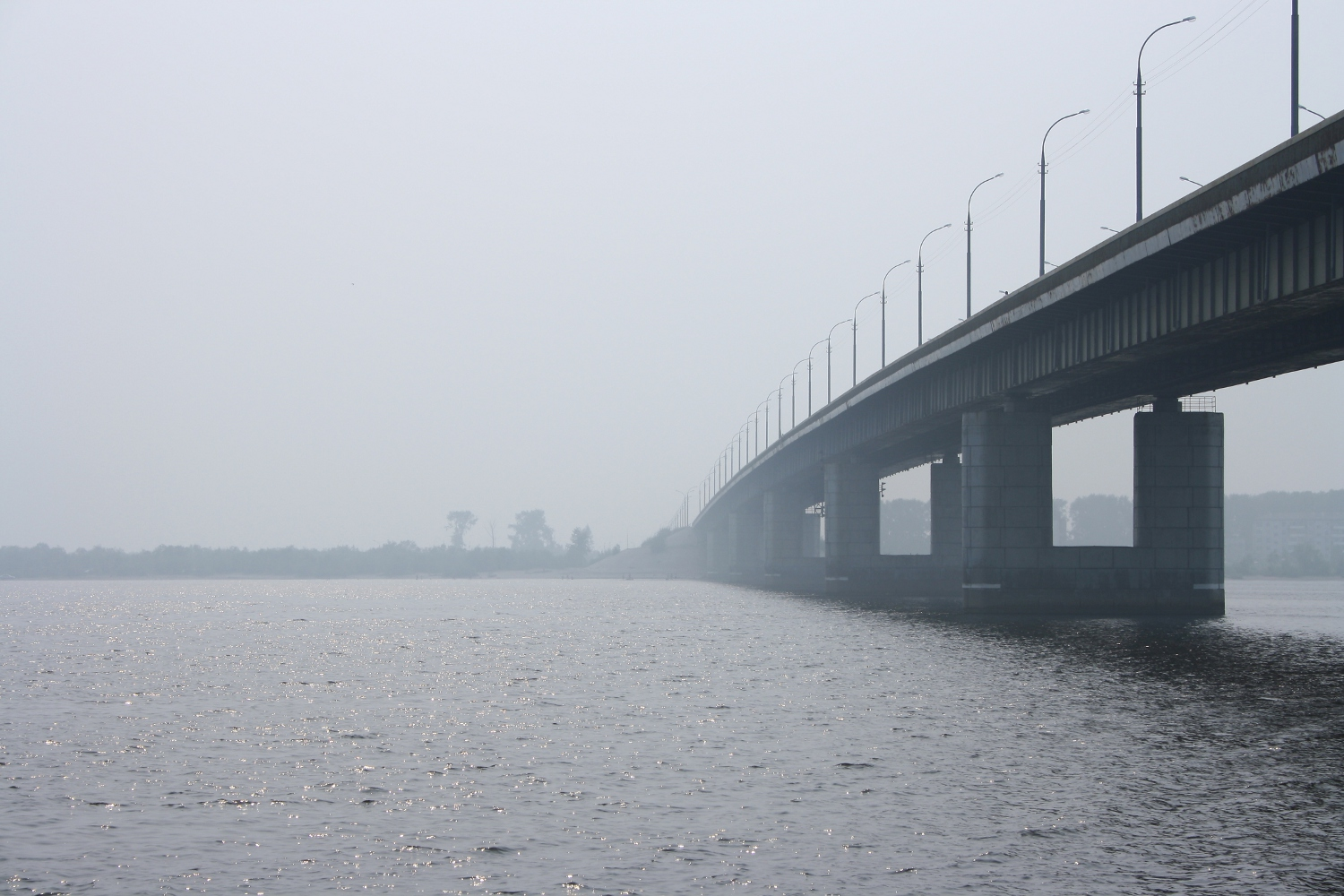 Краснофлотский мост